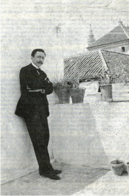 Nicolas Tenorio Cerero